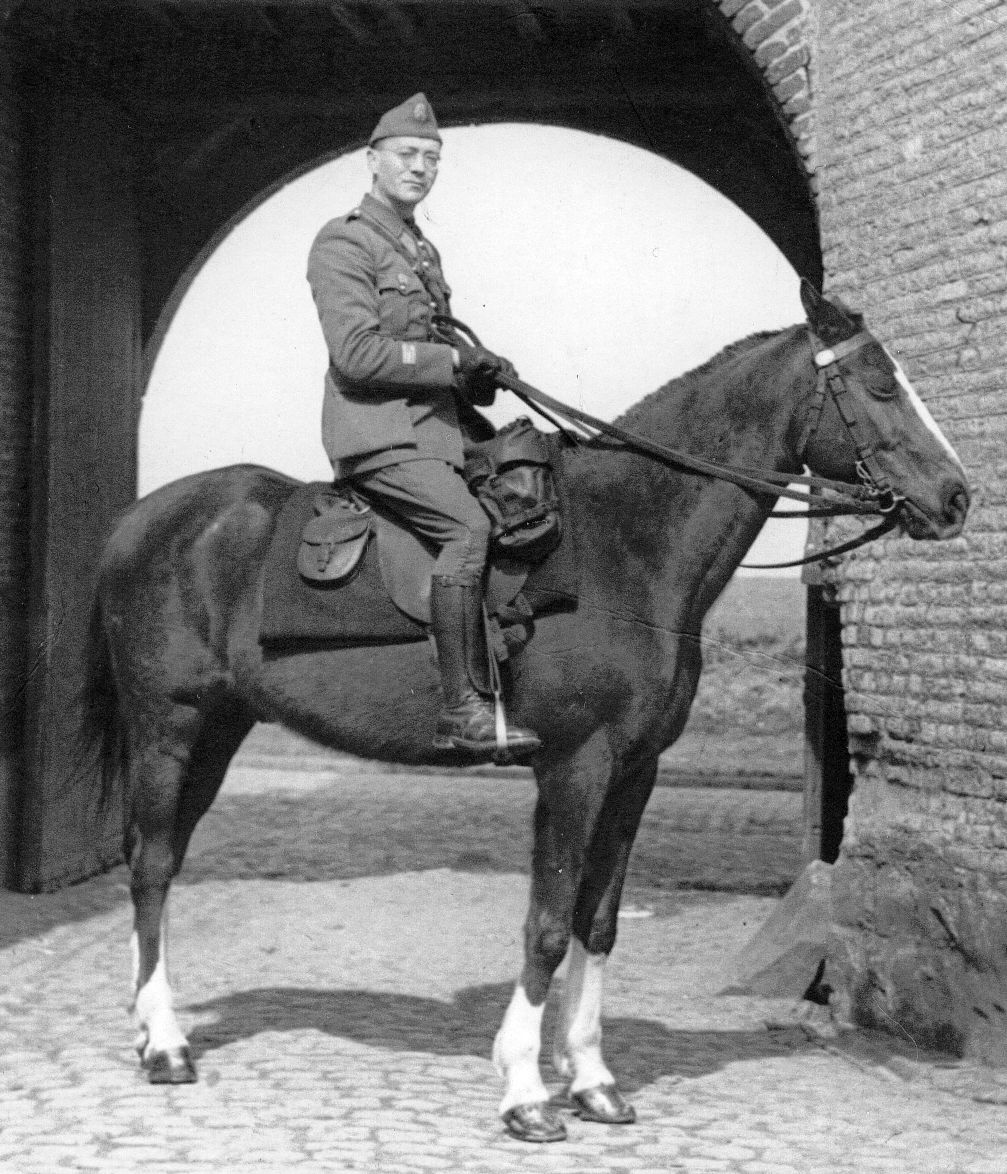 Roger BOUVET, Capitaine au 106e Régiment d'artillerie lourde sur son cheval "Véloce"